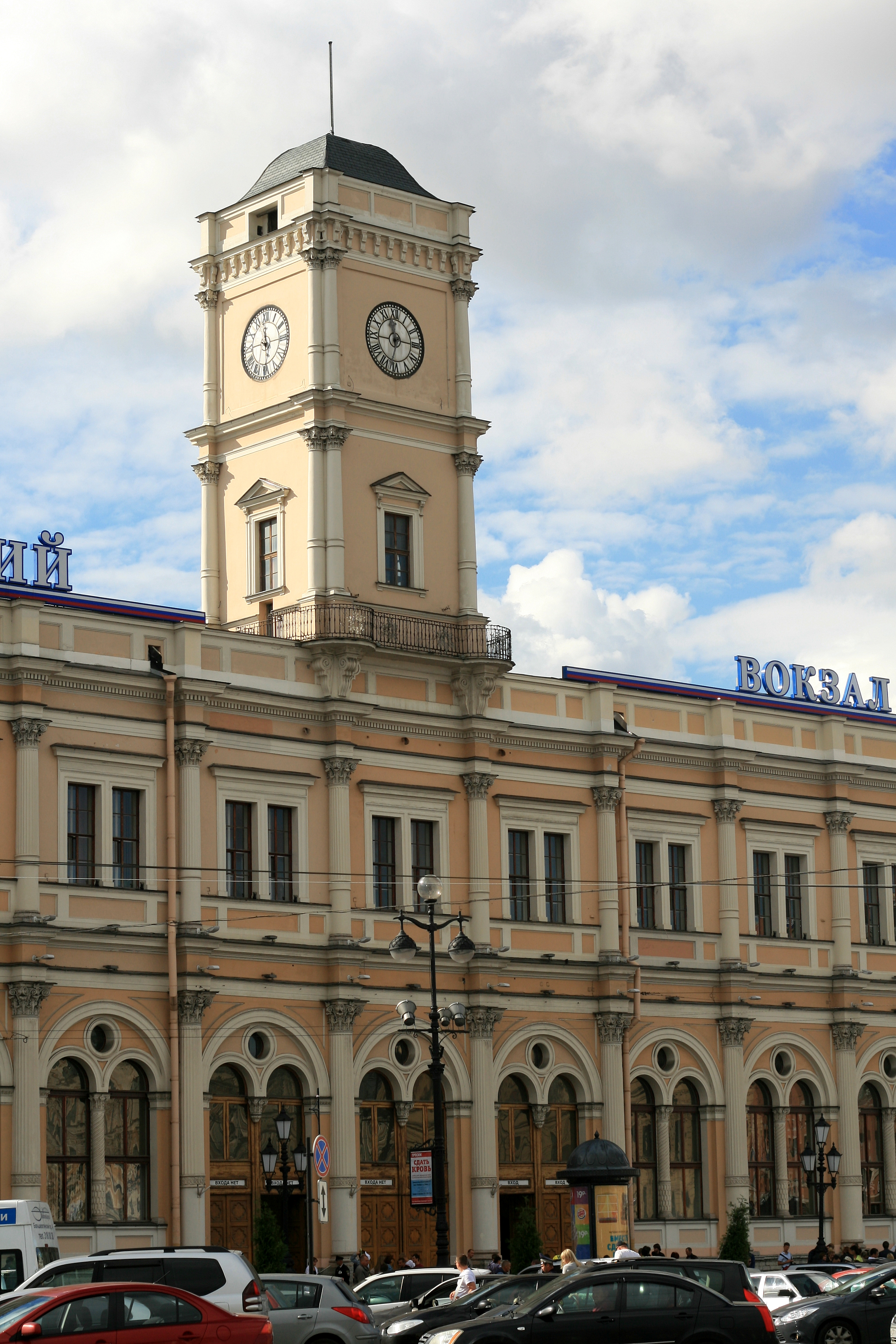 Вокзал Николаевский (Московский) (Санкт-Петербург и Лен.область, Санкт-Петербург, Восстания площадь, 2)